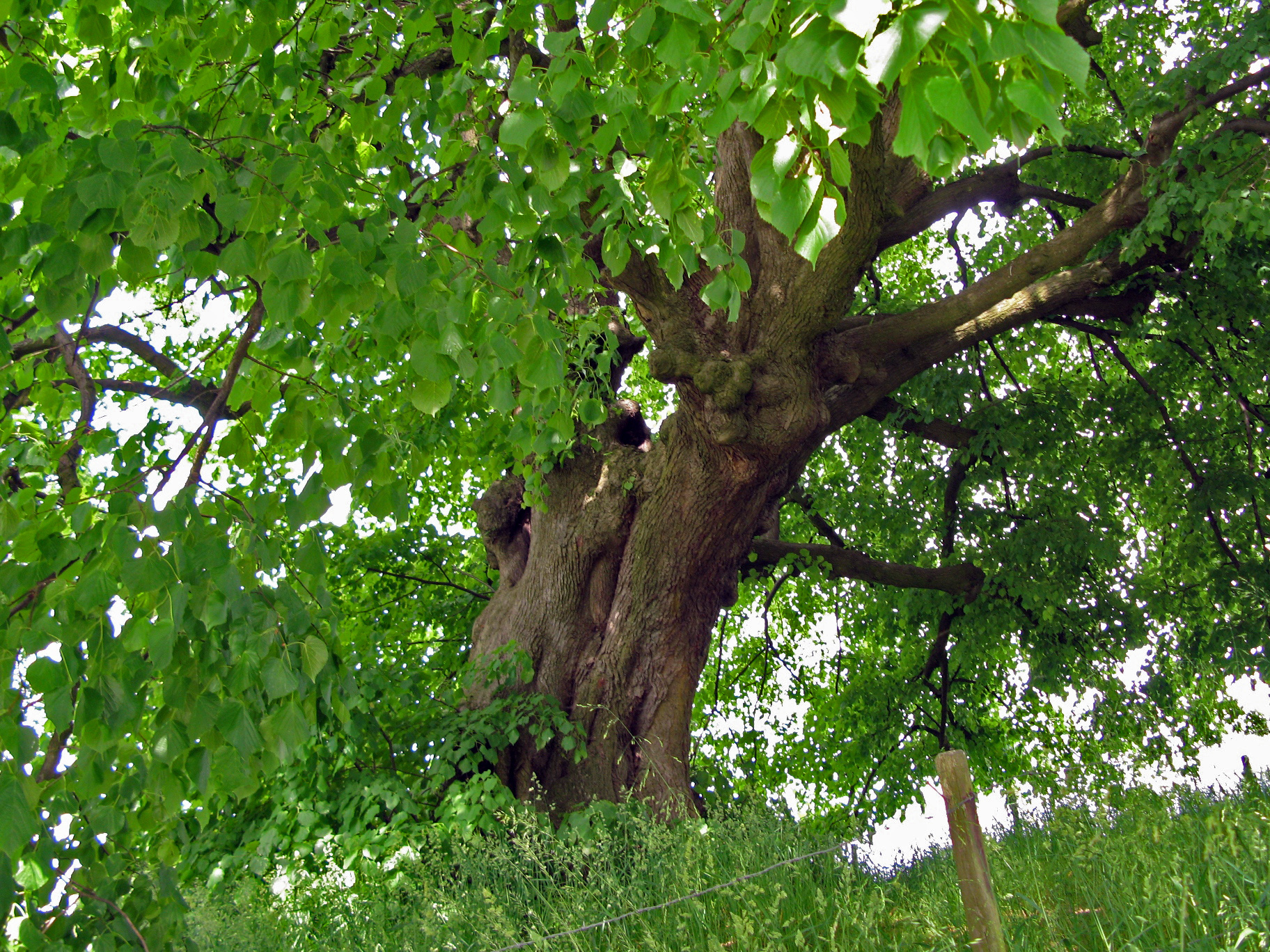 De Stamm vum Appelboom am Mee 2008